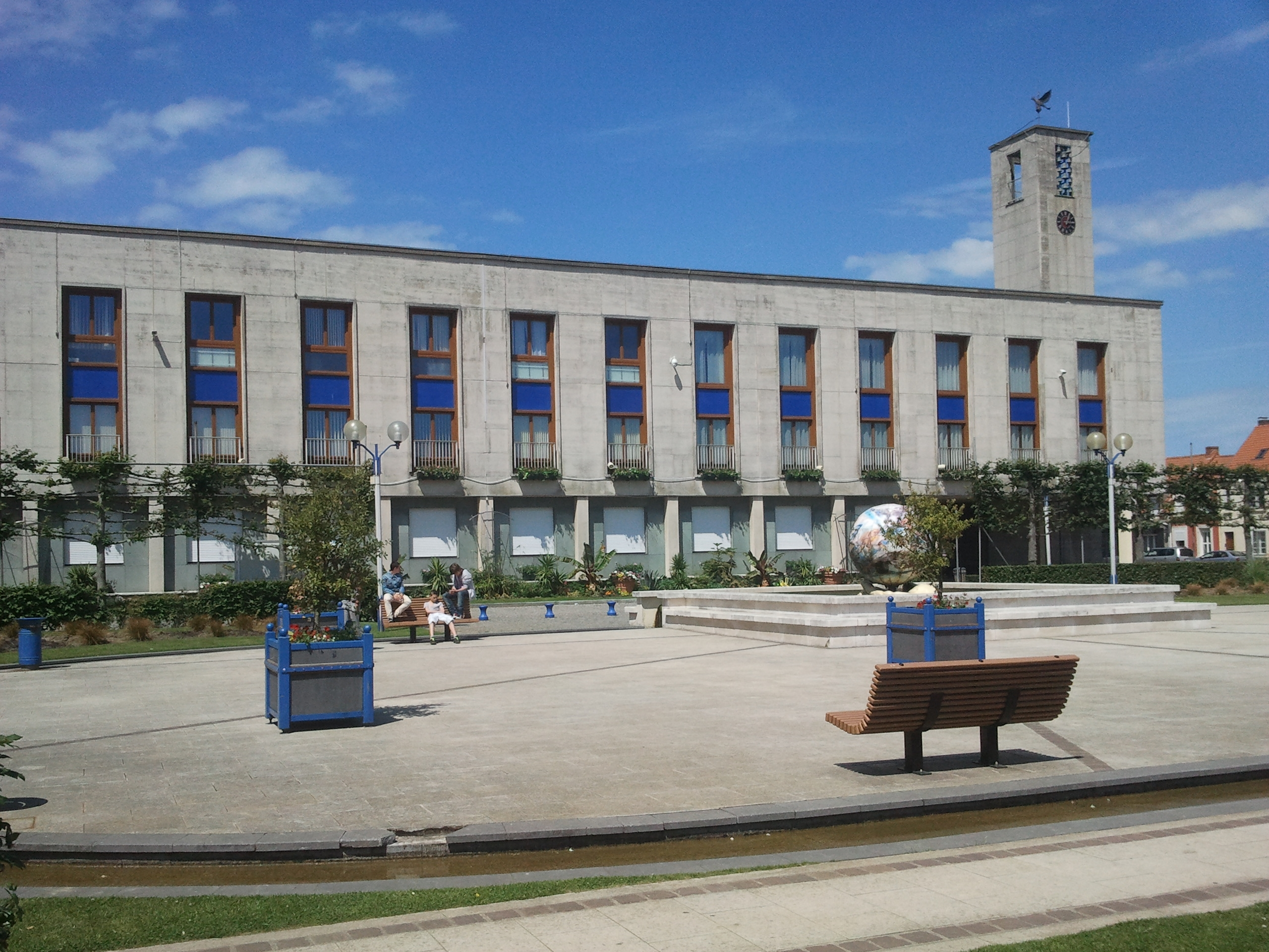 Hôtel de ville d'Outreau (Pas-de-Calais, France)